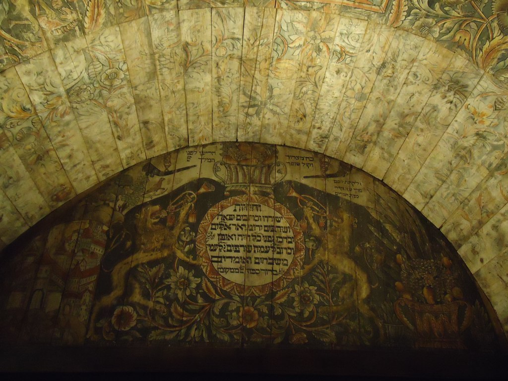 DSC08894 Israel